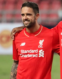 Liverpool FC in Bangkok 2015